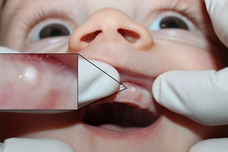 Epstein-Perle am Kiefer eines 6-Monate alten Kindes.